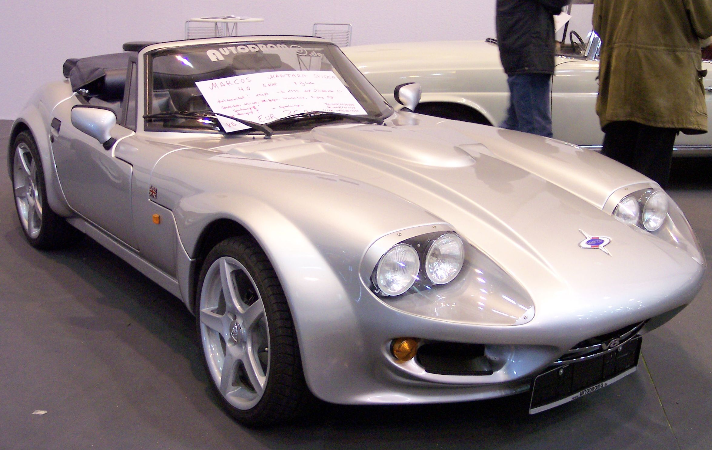 Marcos Mantara Spyder